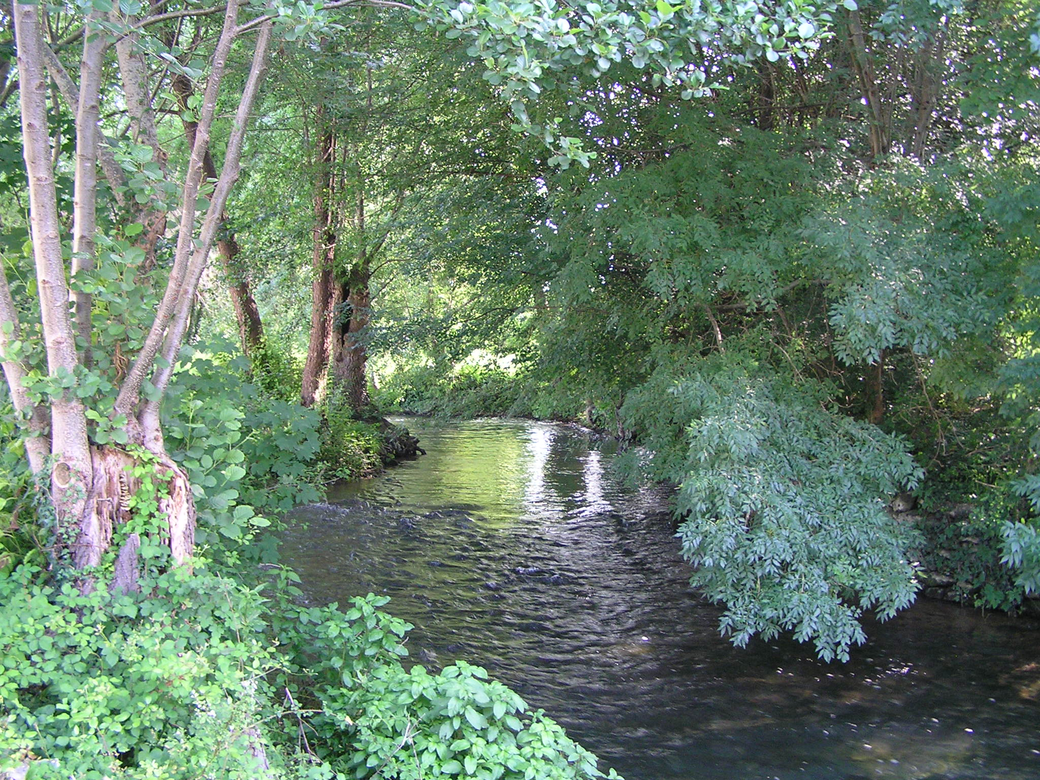 L’Antenne près de Cherves-Richemont